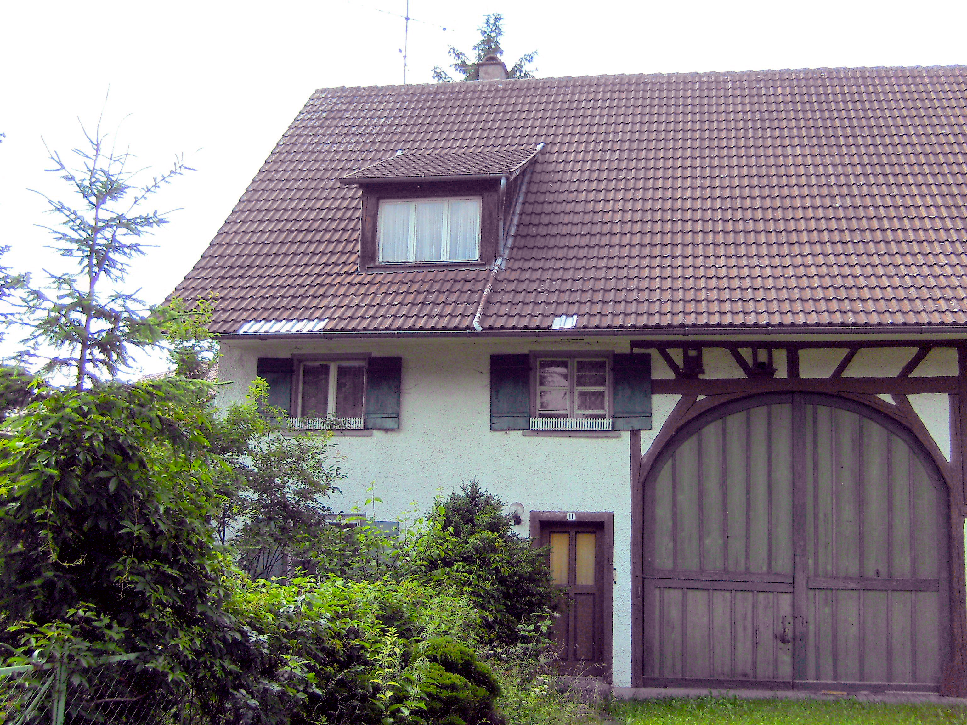 Haus (s'Höfle) in dem Maria Menz die überwiegende Zeit nach 1943 in Oberessendorf gewohnt hat.